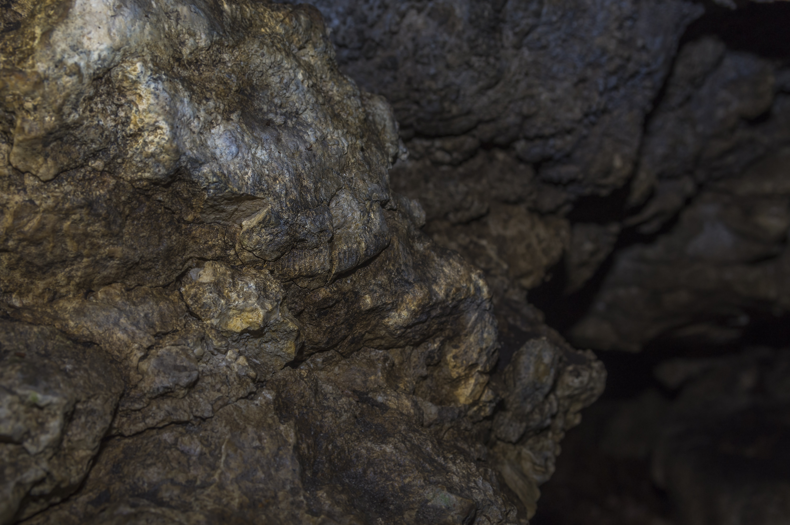 Jaskinia bez Nazwy w Wąwozie Żarskim